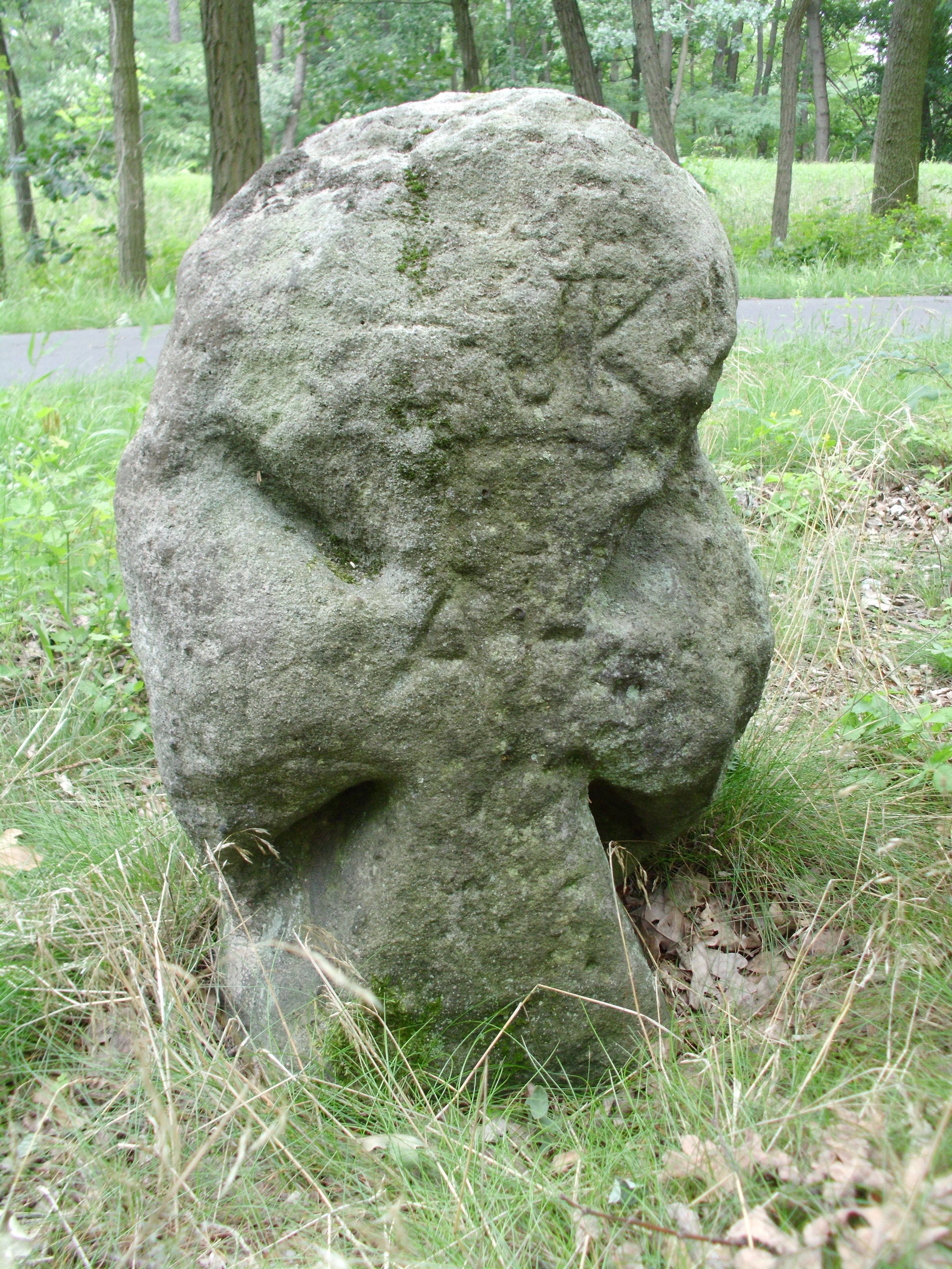 Sühnekreuz an der B 87, Oegeln, Brandenburg, Germany